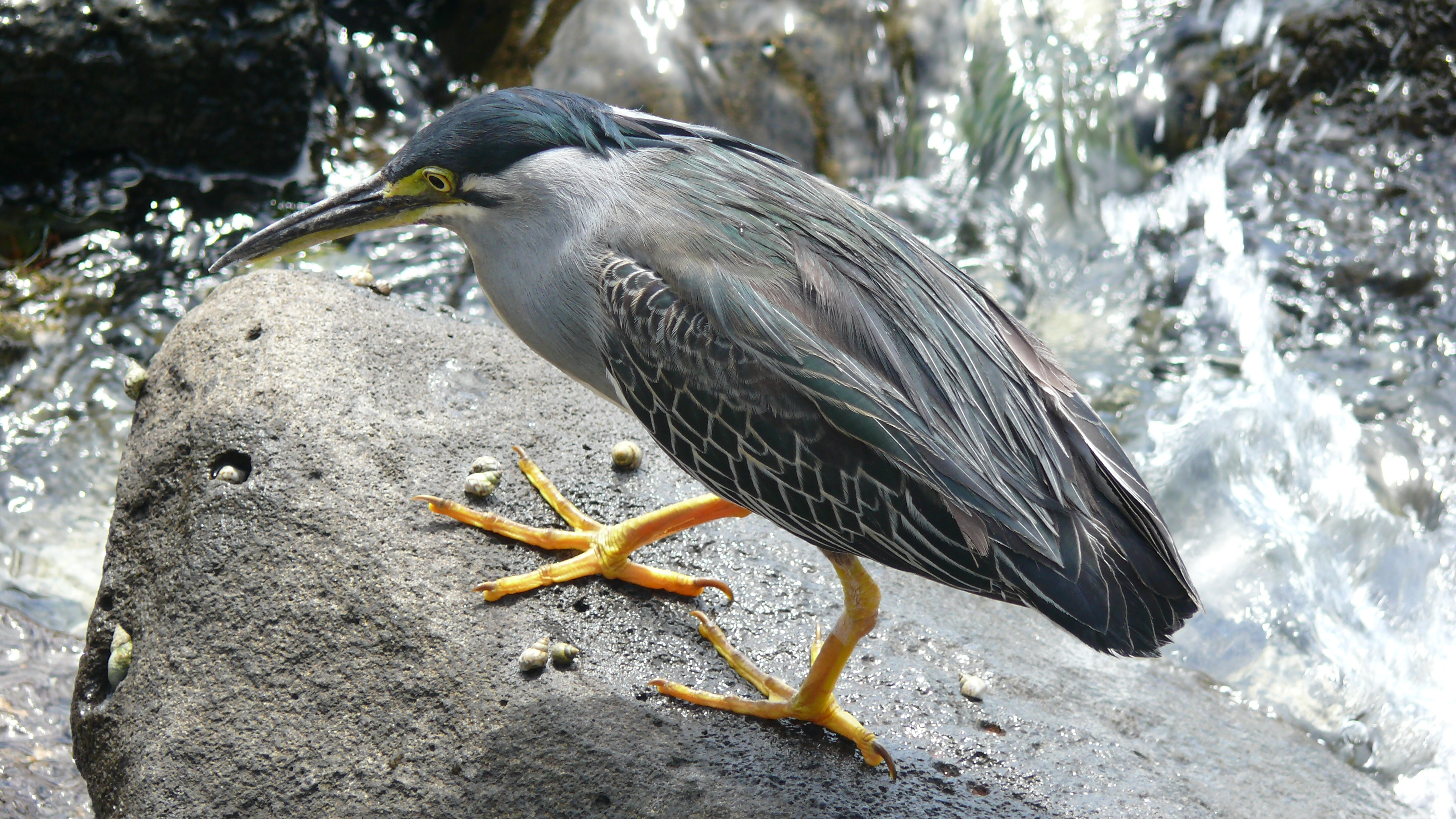 Mangrovereiher